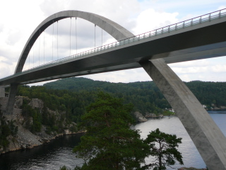 Svinesund Bridge.